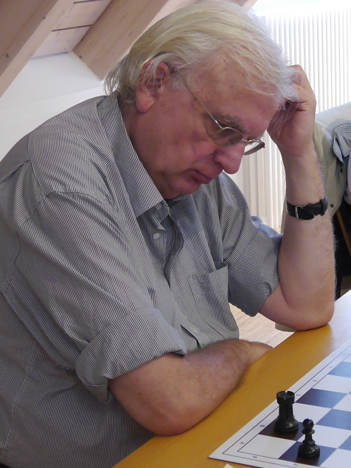 Günther Ballon, FIDE-Meister und Internationaler Fernschachmeister, Sieger des Seniorenturniers 2016 in Haslach im Kinzigtal.